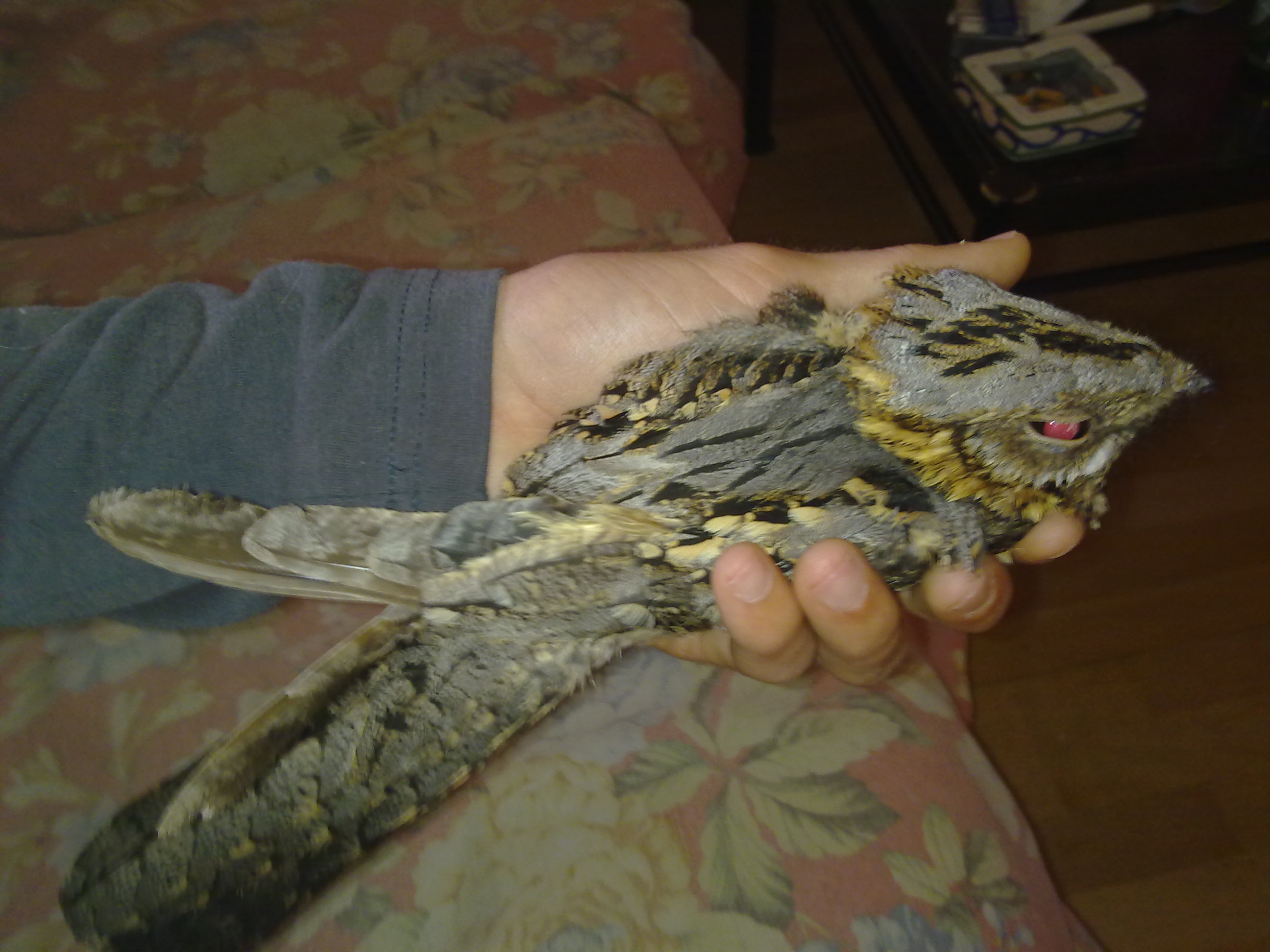 Macho de Caprimulgus ruficollis